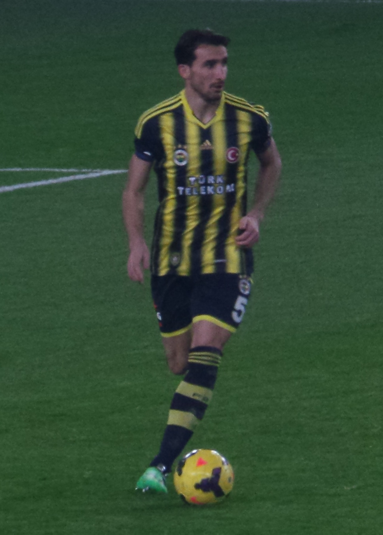 Mehmet Topal 2014'te Kasımpaşa maçında